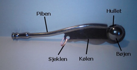 Bådsmandspibe med betegnelser.